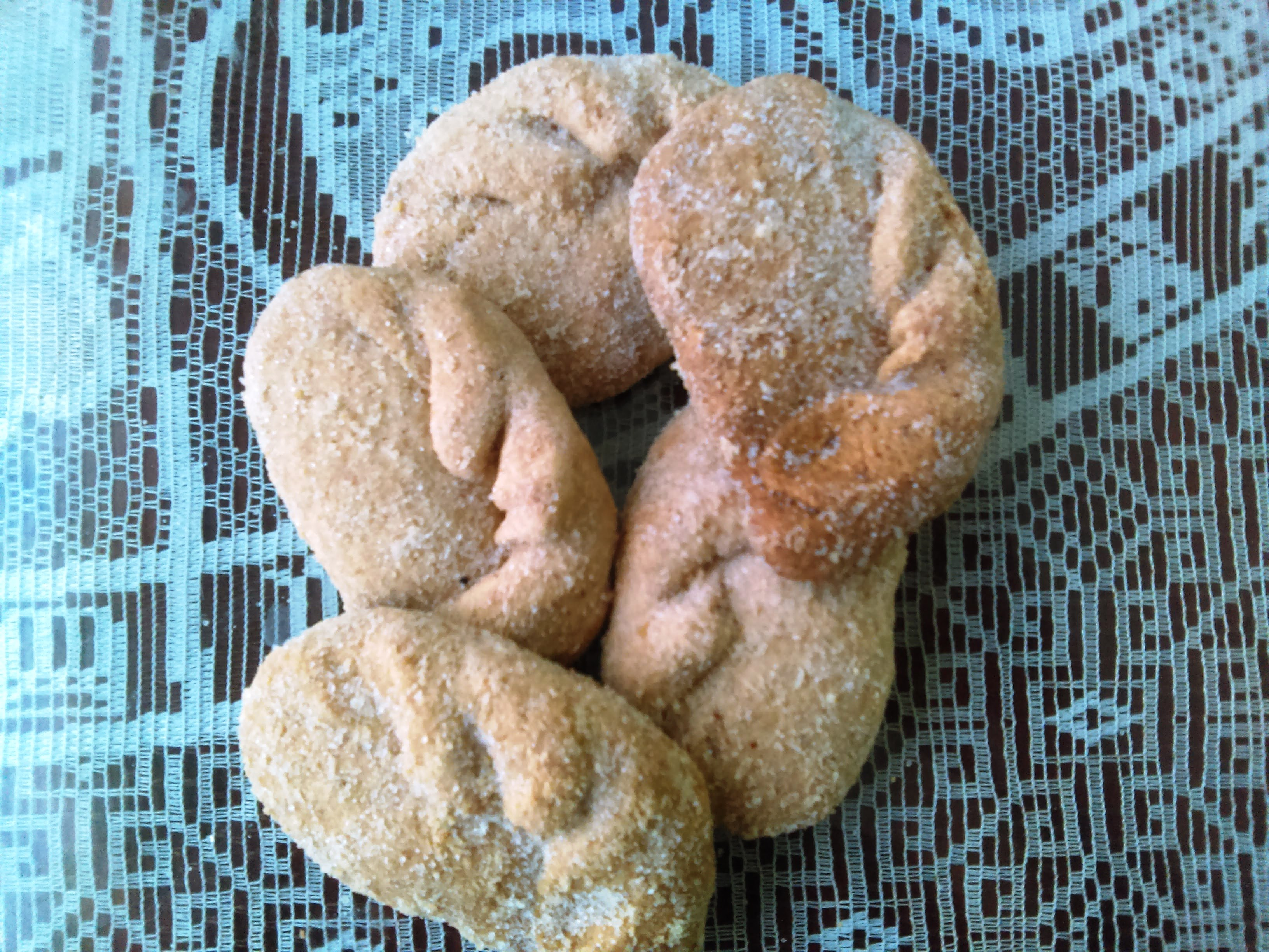 Galleta " Fruta de Horno" del Estado de Hidalgo México.